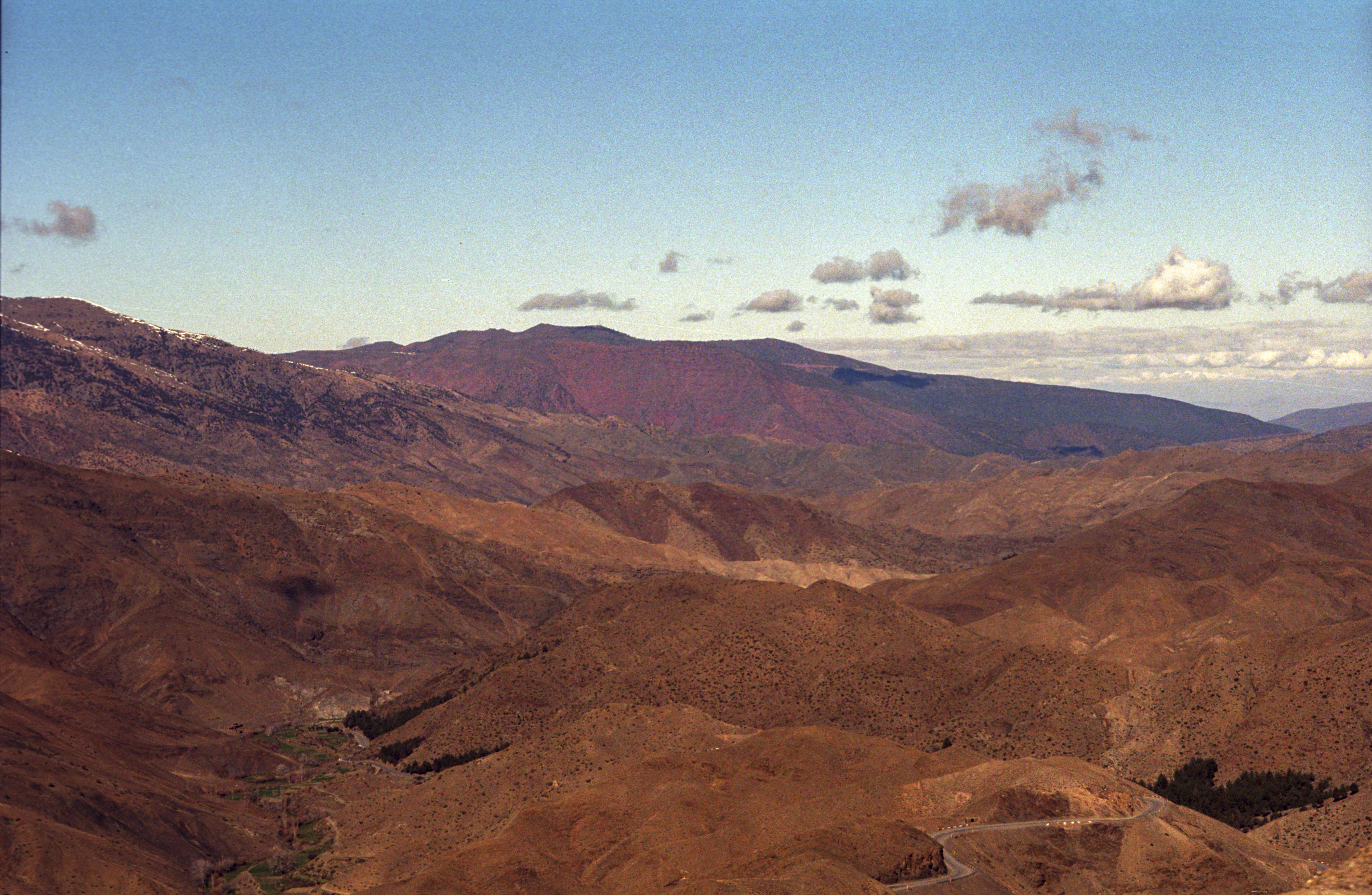 W Atlasie Wysokim